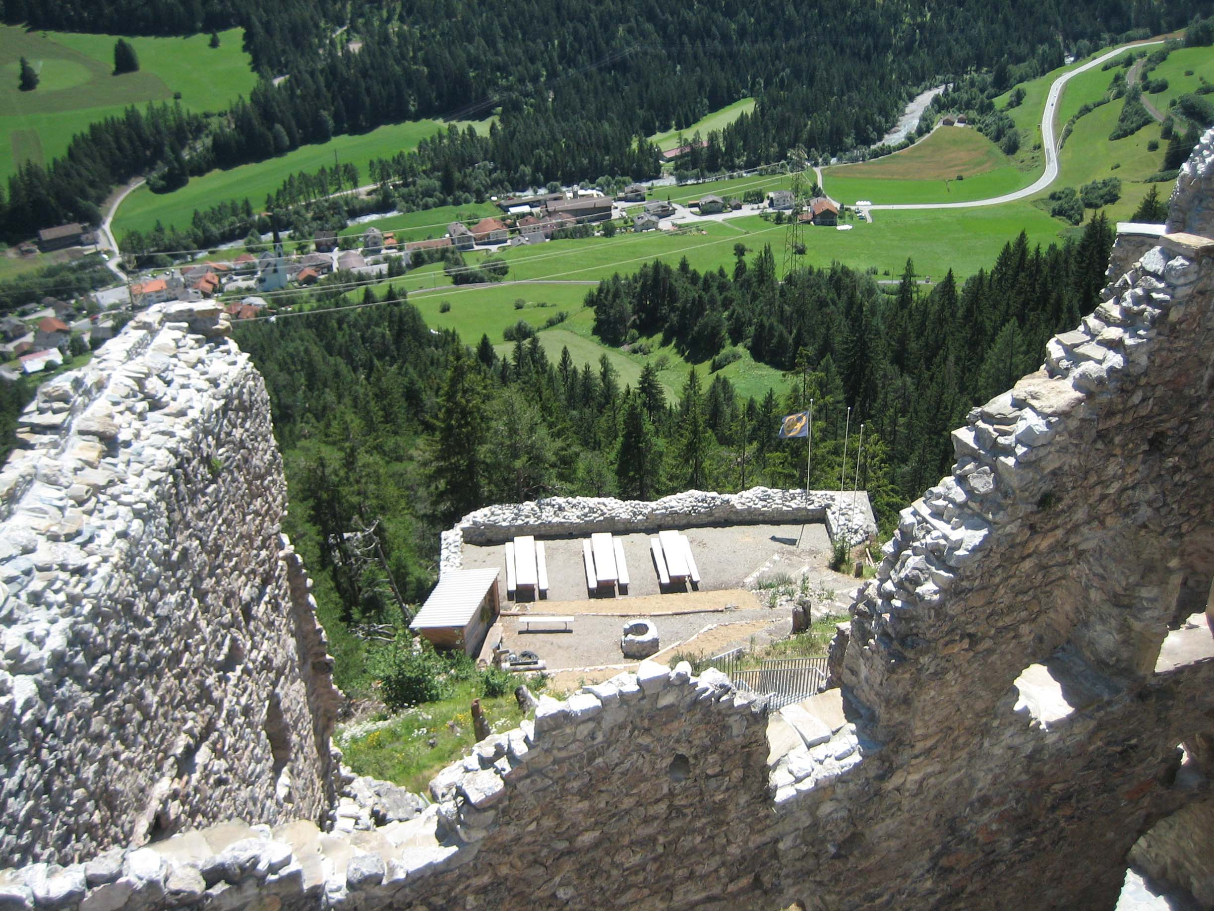 Blick nach Süden, unten Surava